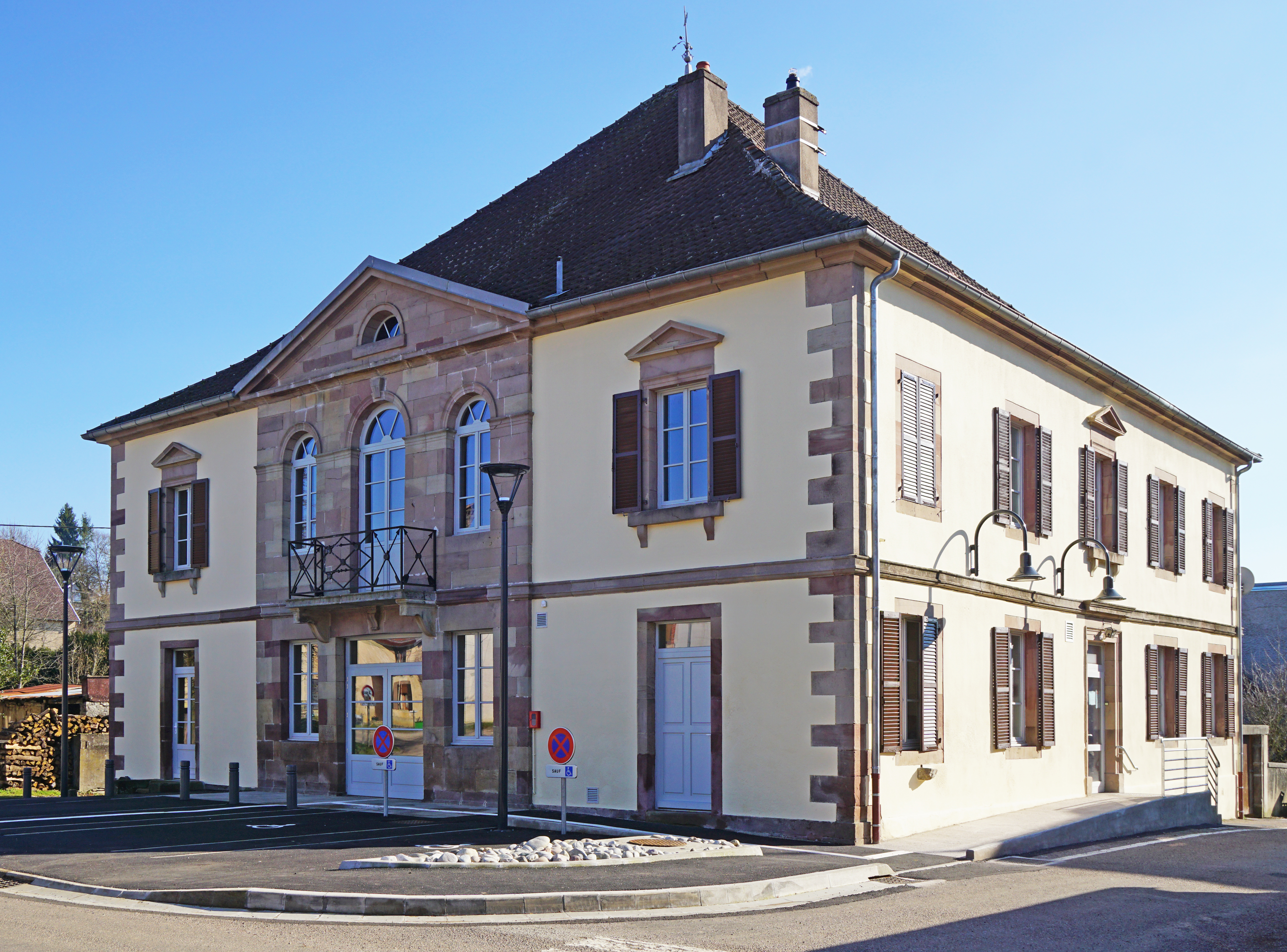 La maison commune (mairie-école) de Mollans rénovée de janvier 2016 à janvier 2017.